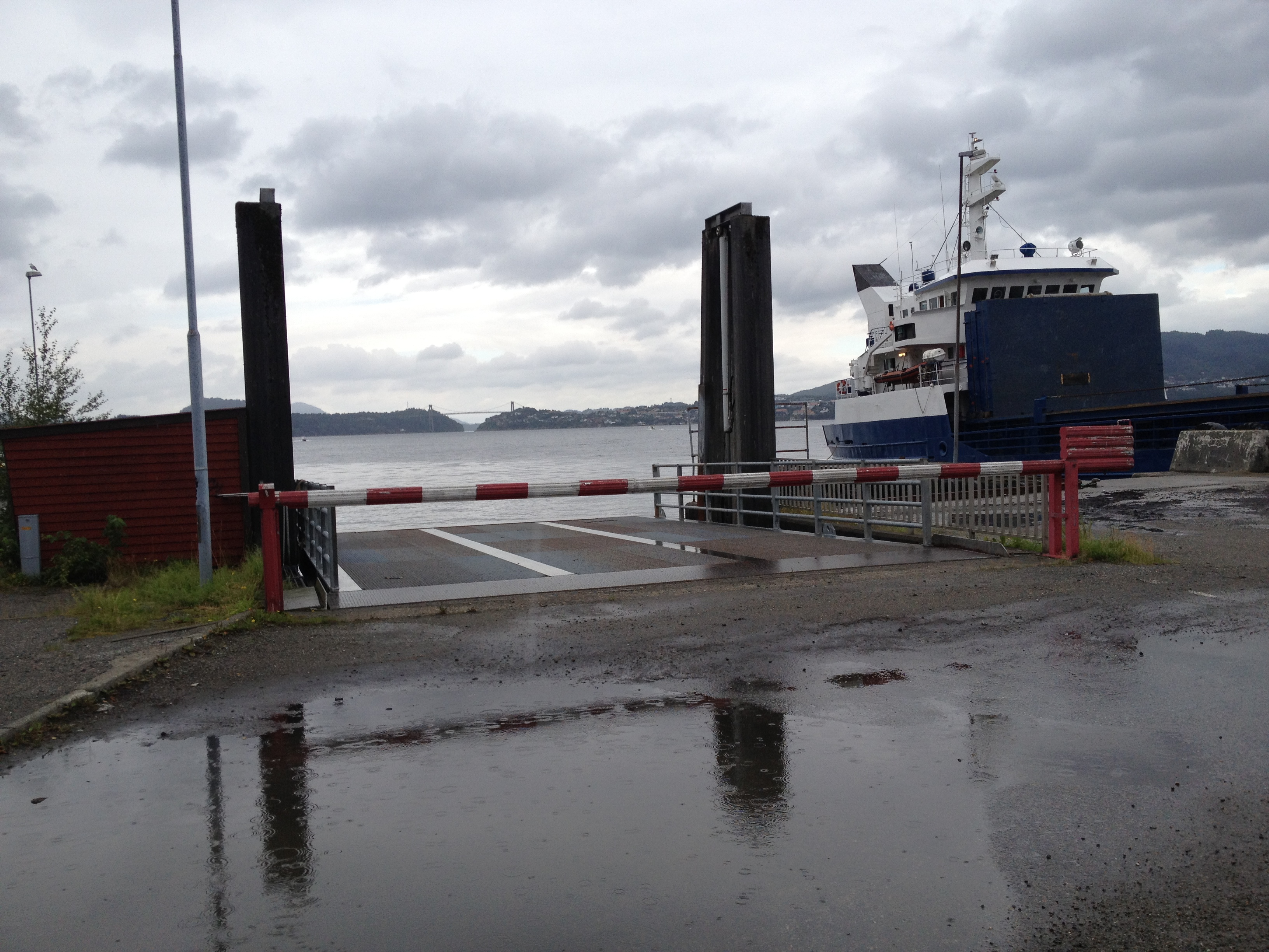 Steinestø ferjekai, august 2013